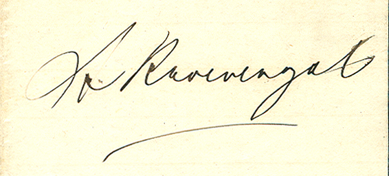 digitaler Ausschnitt der handschriftlichen Gegenzeichnung (?) von Albert Knoevenagel.